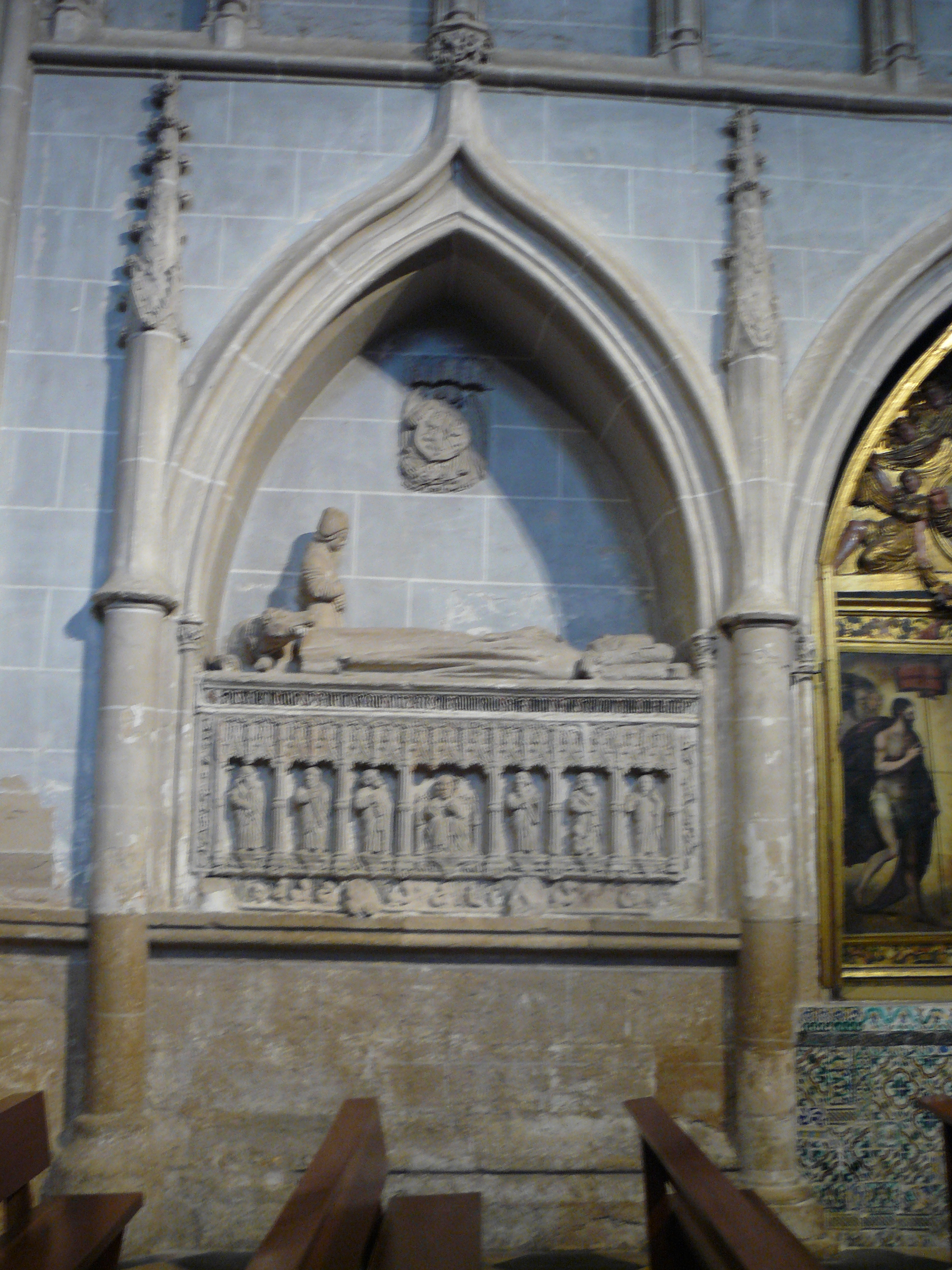 Sepulcro del arcediano Rodrigo Enríquez, fallecido en 1465 e hijo del almirante de Castilla Alonso Enríquez y bisnieto del rey Alfonso XI de Castilla. Fue realizado por el entallador Alonso de Portillo en el siglo XV y está colocado en el primer tramo del lado del Evangelio de la parte exterior de la capilla mayor de la catedral de Palencia, provincia de Palencia, (España).